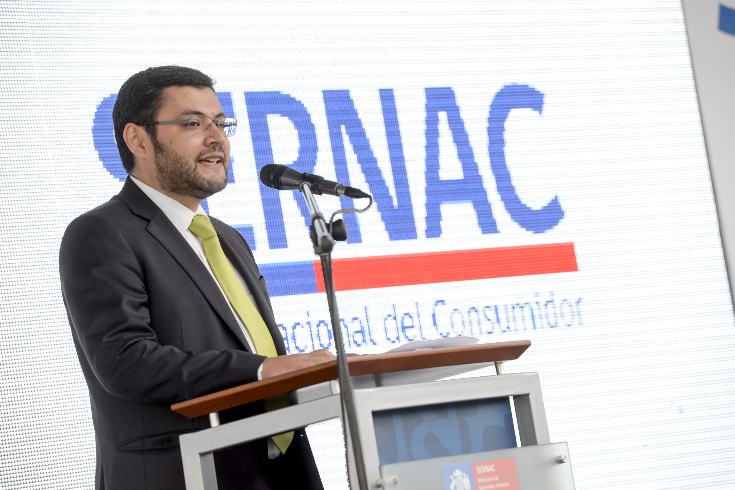 Ministro Elizalde participa en la 5ta Feria del Consumidor